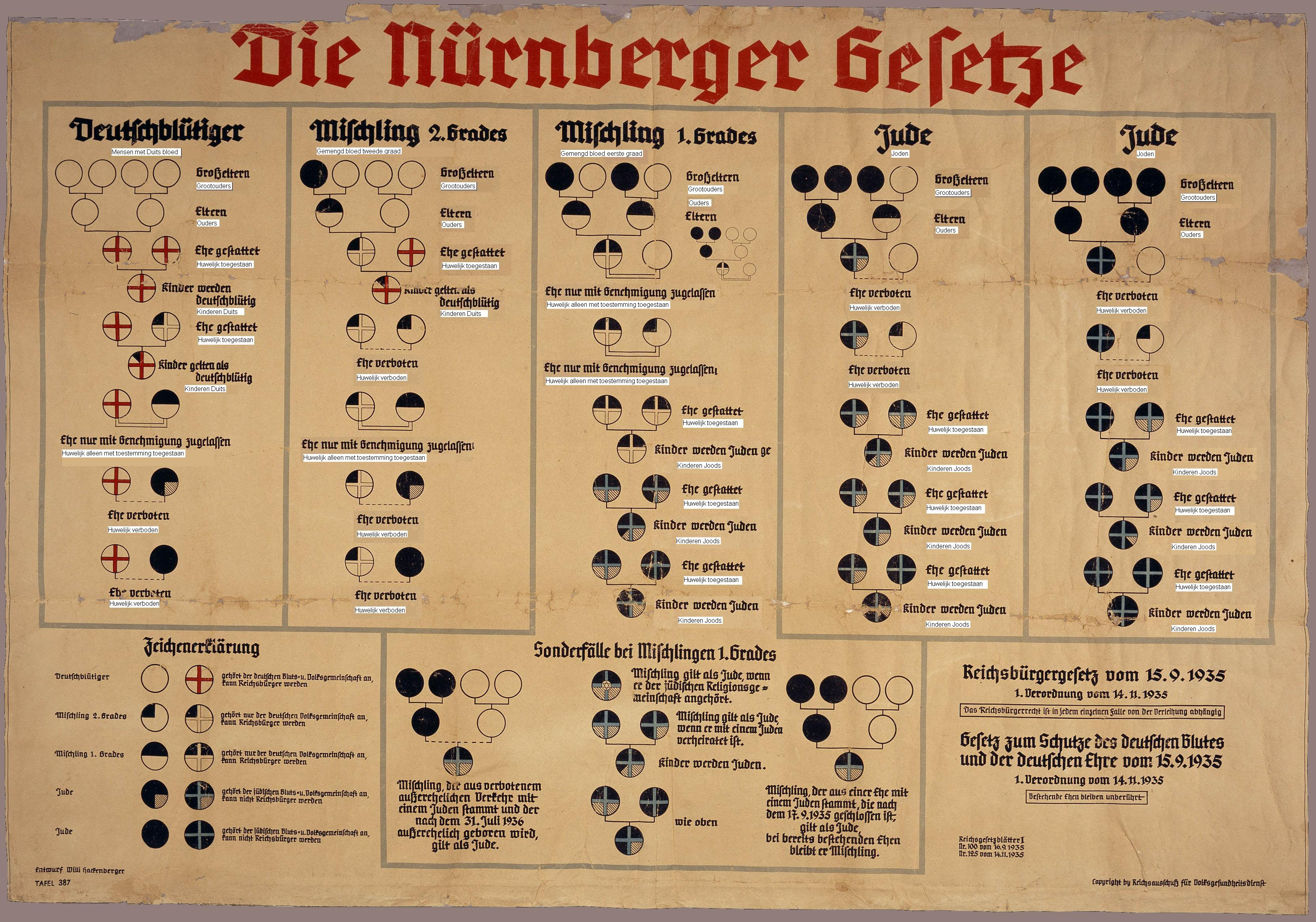 Uitleg van de Rassenwetten van Neurenberg (met nederlands onderschrift)